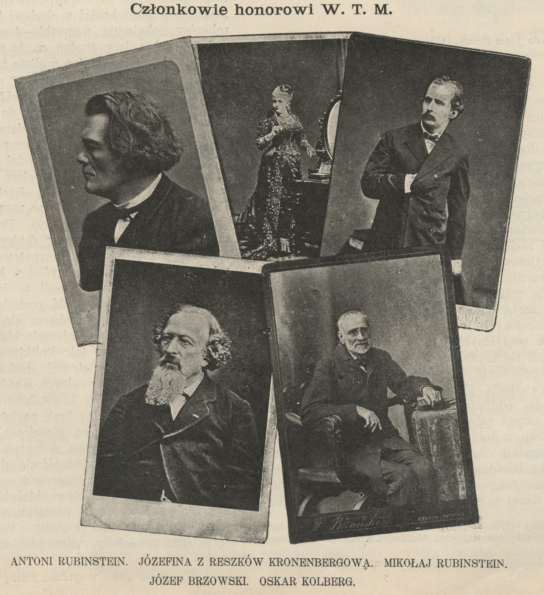 Członkowie honorowi W.T.M.: Józef Brzowski; Oskar Kolberg; Józefina z Reszków Kronenbergowa; Antoni Rubinstein; Mikołaj Rubinstein